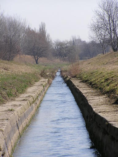 Rákos-patak in Rákosmenete, Budapest